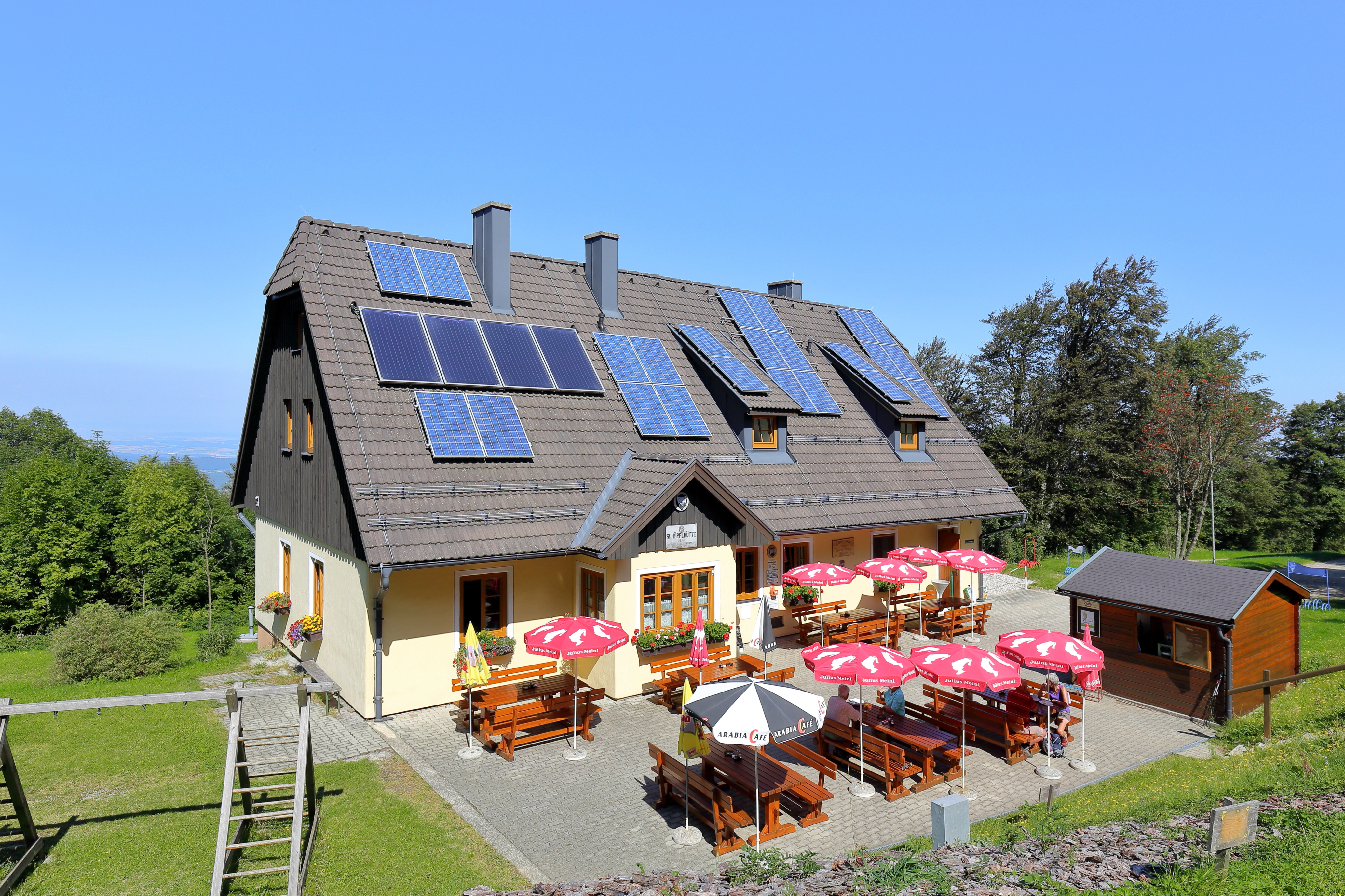 Südansicht des Schöpfl-Schutzhauses auf dem Schöpfl in der niederösterreichischen Gemeinde Brand-Laaben und unmittelbar neben den Gemeindegrenzen von Altenmarkt an der Triesting sowie Klausen-Leopoldsdorf. Bereits am 12. Aug.1906 wurde auf dem höchsten Berg des Wienerwaldes ein hölzernes Schutzhaus eingeweiht und später (?) nach dem damaligen Obmann des Touristenklubs Wienerwald Franz Krebs benannt. Nach einer Erweiterung im Jahr 1911 brannte das Schutzhaus im Nov. 1920 ab. Ein steinerner Nachfolgebau wurde am 16. Sep. 1923 eingeweiht und im April 1945 durch Artilleriebeschuss zerstört. Nach dem Krieg erfolgte eine Neuerrichtung aus Barackenteilen und am 16. Okt.1949 eröffnet. Das jetzige wurde ab 1997 errichtet und mit dem 100-jährigen Jubiläum der nahegelegenen Matras-Warte am 11. Okt. 1998 feierlich eröffnet.